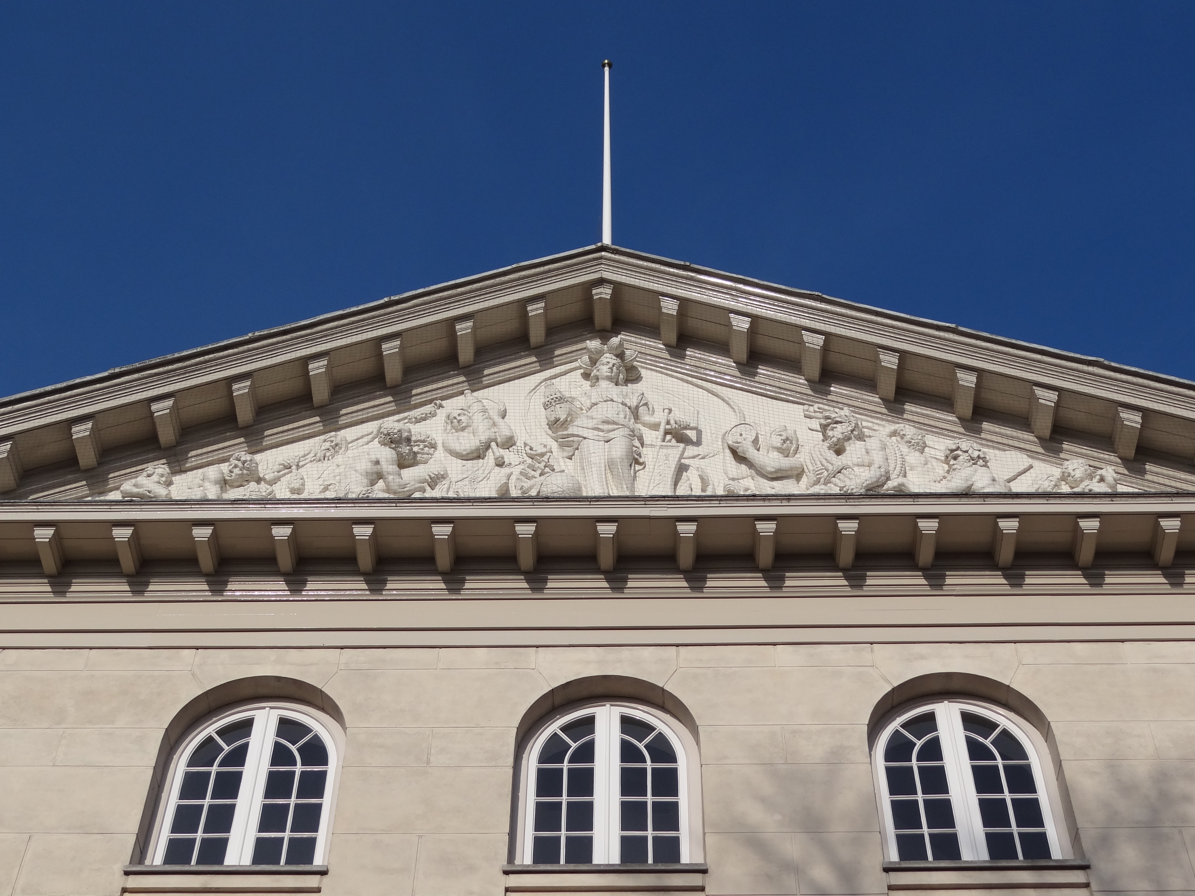 Nederlands Scheepvaartmuseum